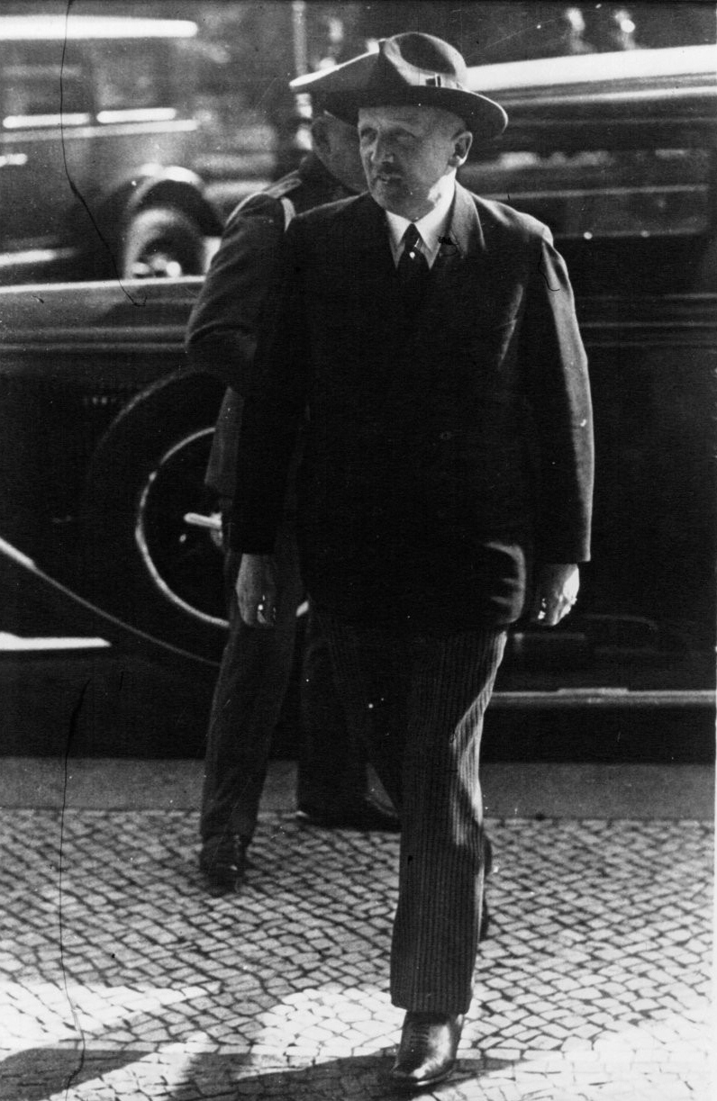 Kurt von Scheleicher, canciller alemán, en 1932.